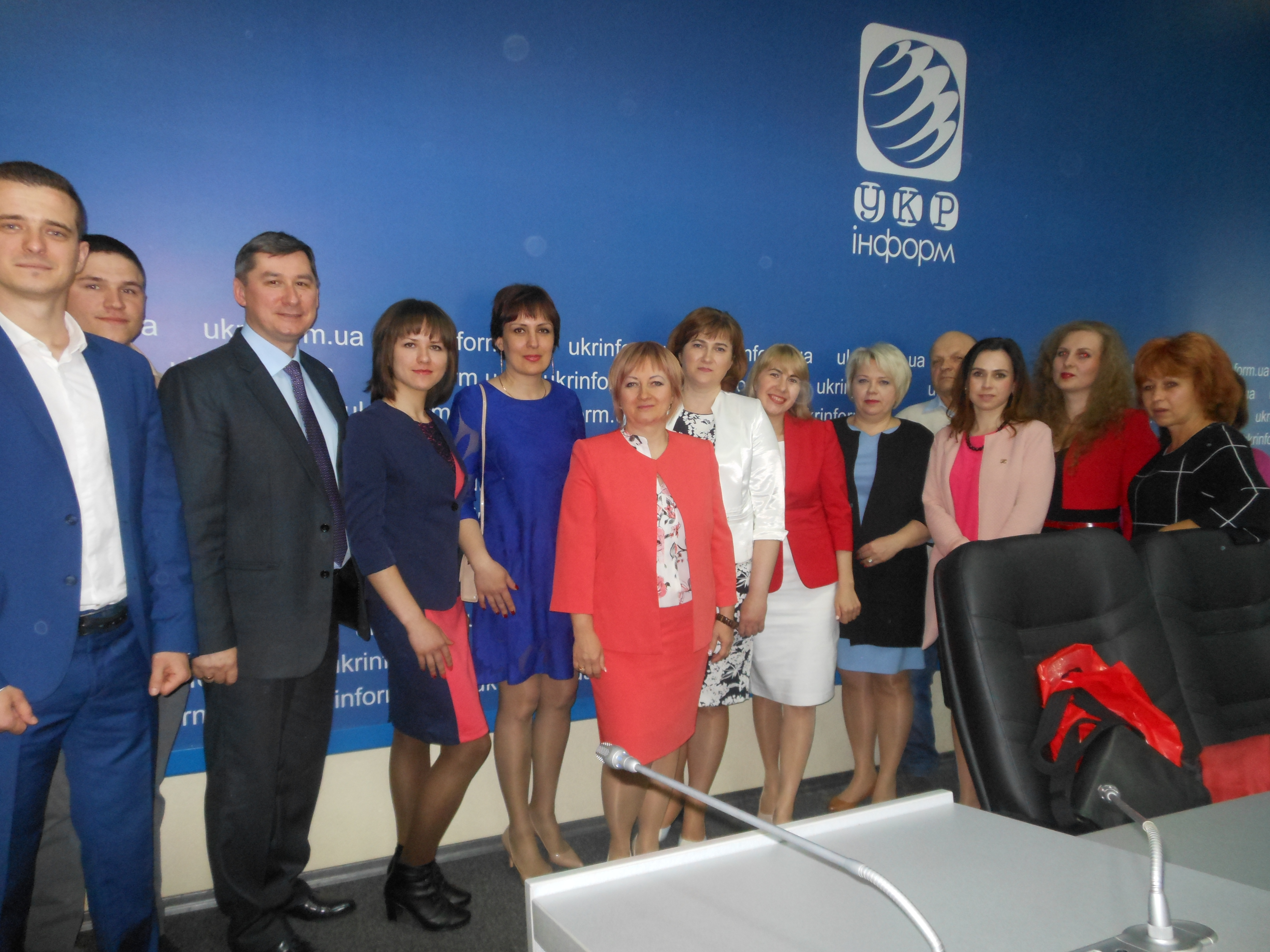 Прес-конференція і урочисте підписання договору між Центральним державним електронним архівом України (ЦДЕА України) та Громадською організацією «Вікімедіа Україна»